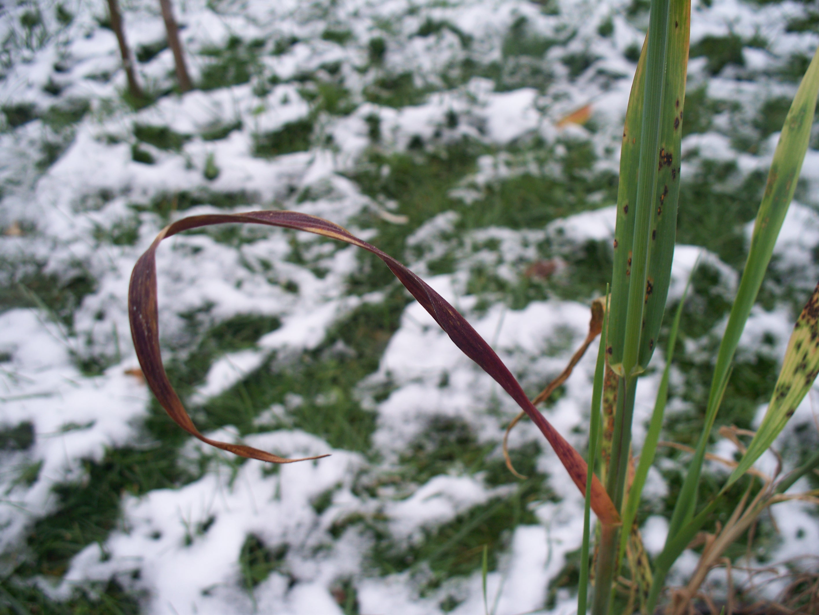 Wirus żółtej karłowatości jęczmienia na owsie